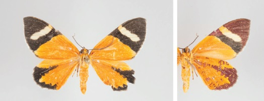 Hagnagora mirandahenrichae